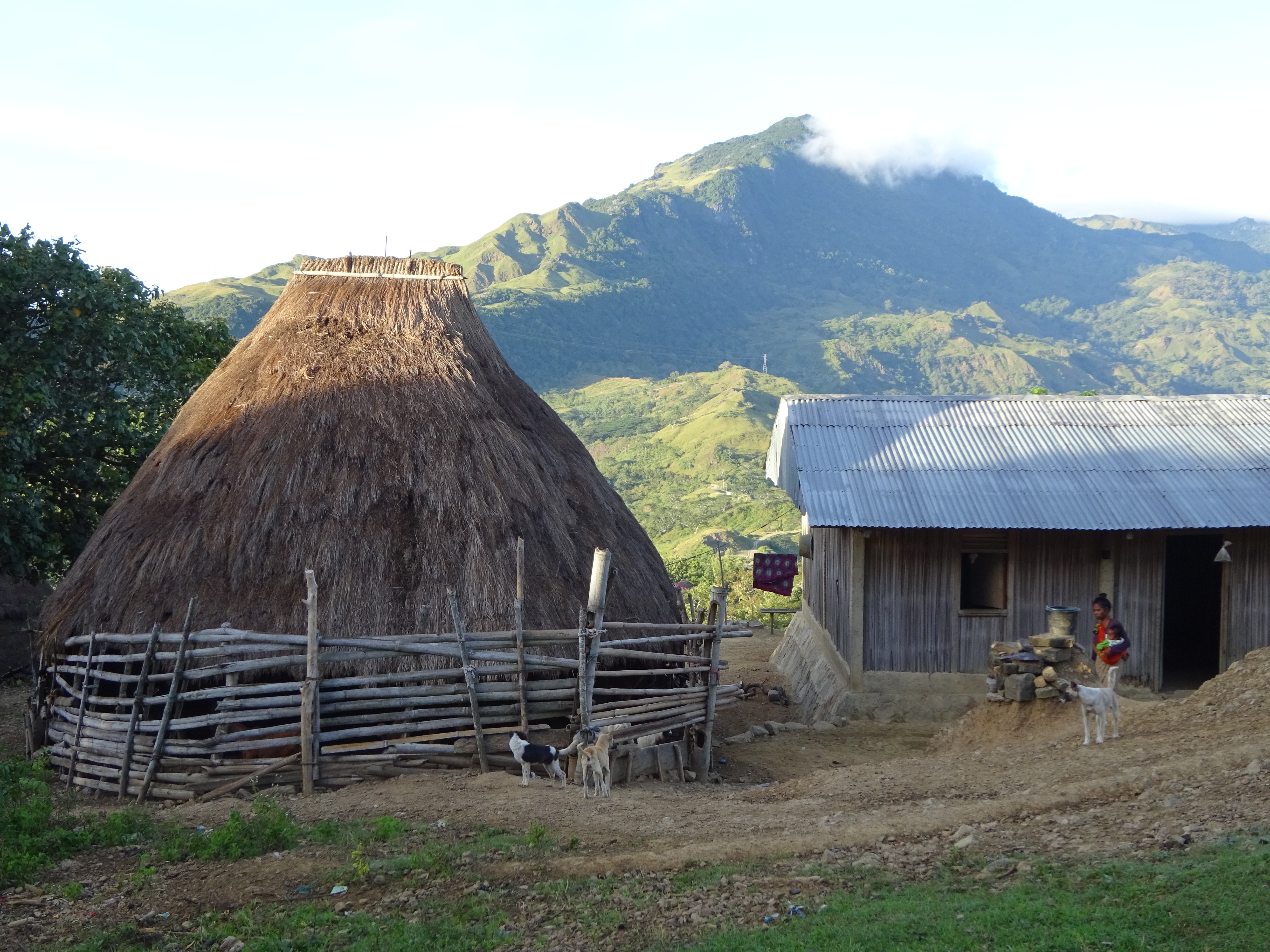 Hütten in Ritabou, mit dem Berg Leolaco im Hintergrund